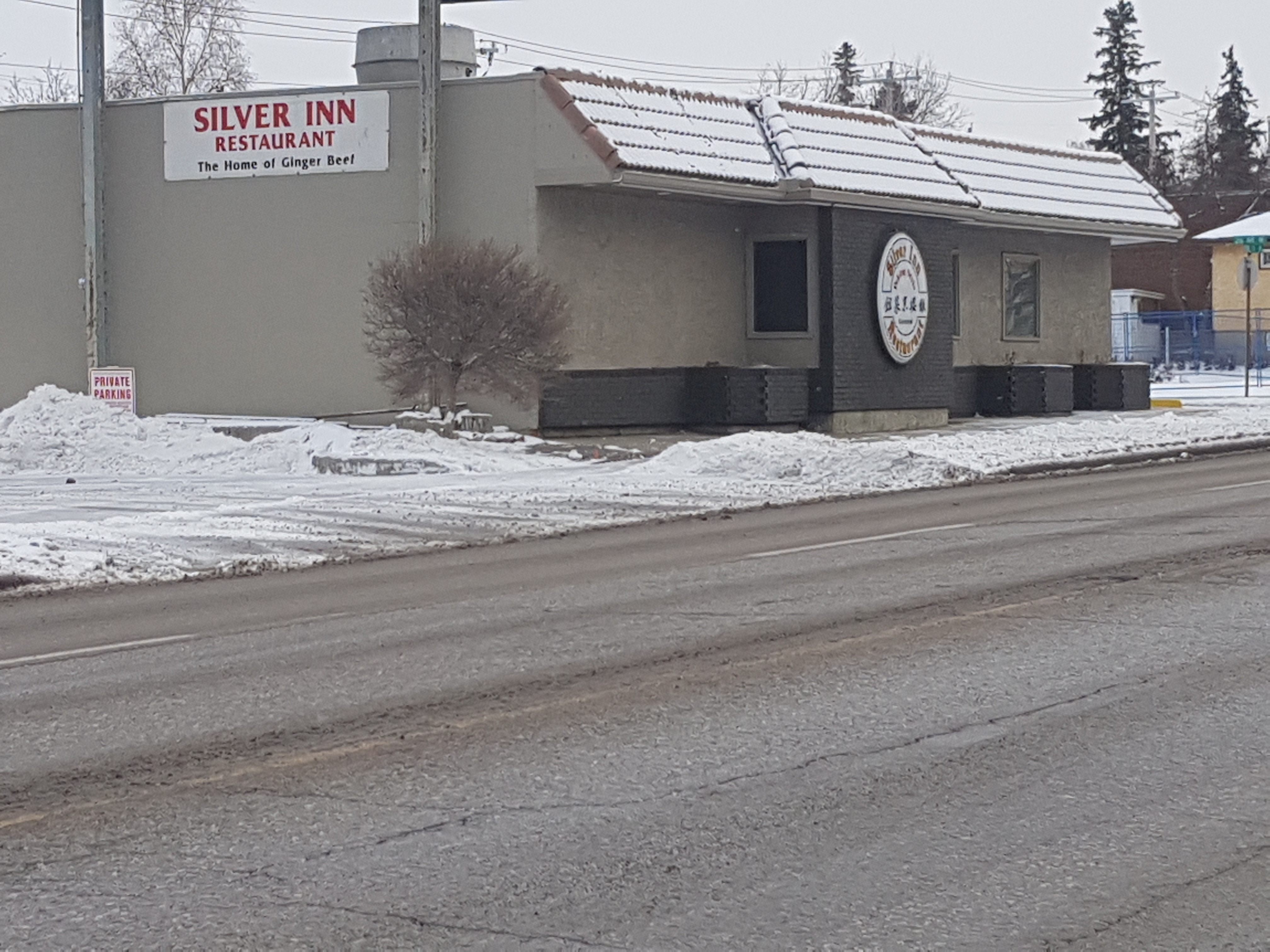 Extérieur de la "Silver Inn", restaurant chinois de Calgary qui créa le ginger beef.